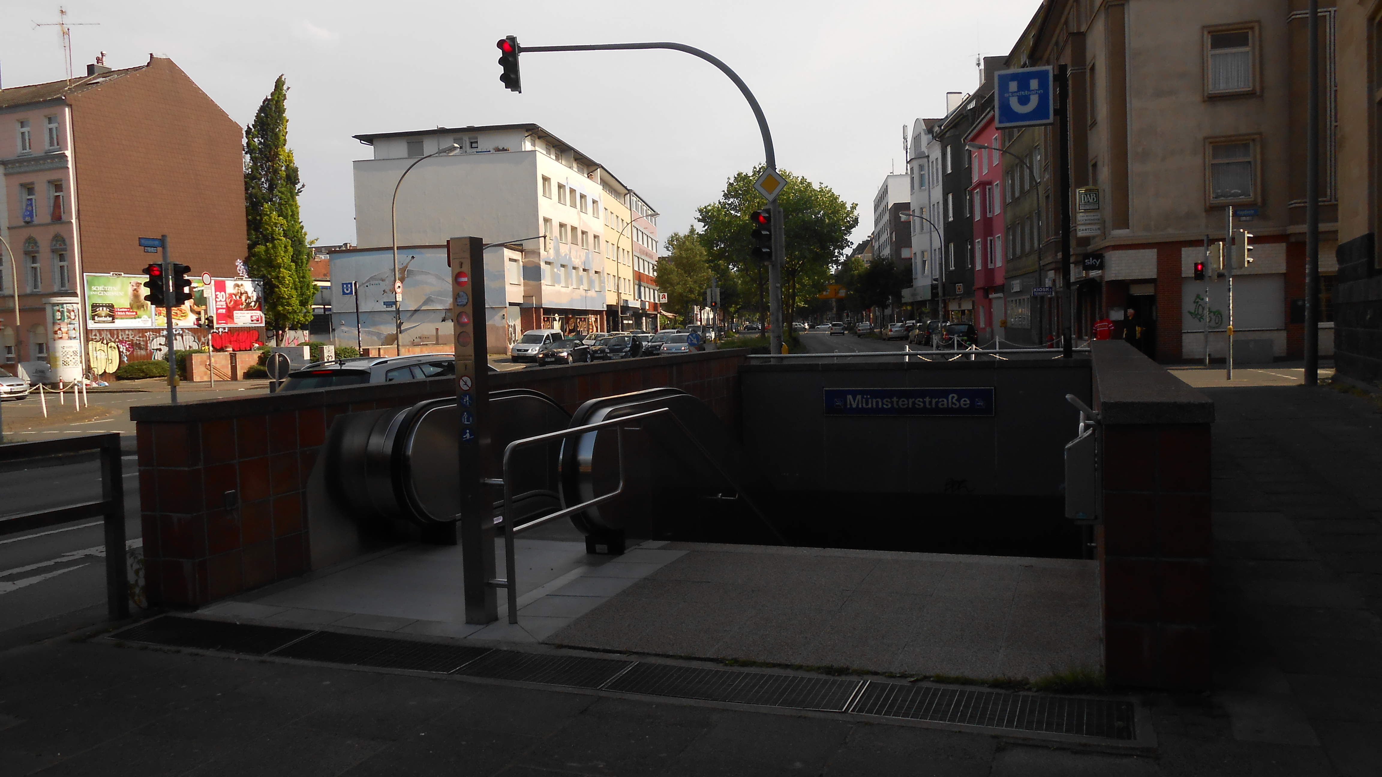 Eingang zum U-Bahnhof Münsterstraße vor dem Helmholtz-Gymnasium.